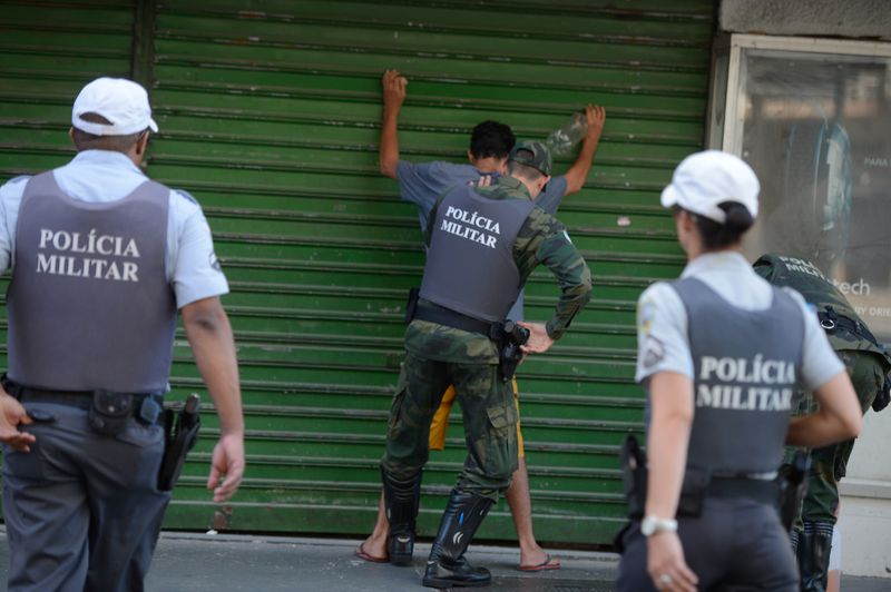 "Policiais militares de férias e de folga voltam às ruas em Vitória"